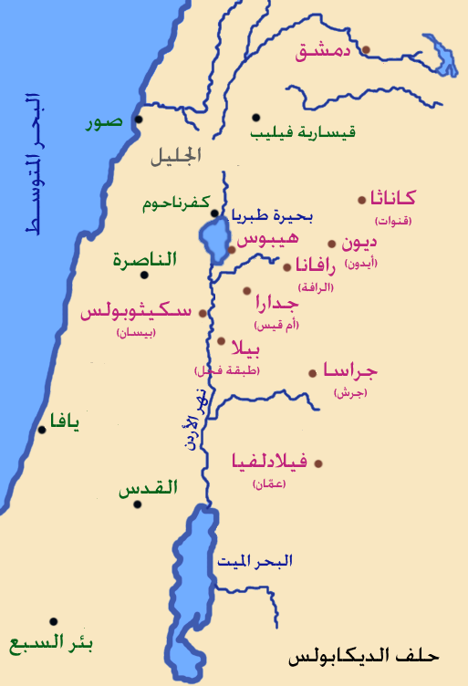 مدن حلف الديكابولس الروماني في بلاد الشام (64 ق.م - 135/117 م)، وأسماؤها العربية الحالية المقابلة لها